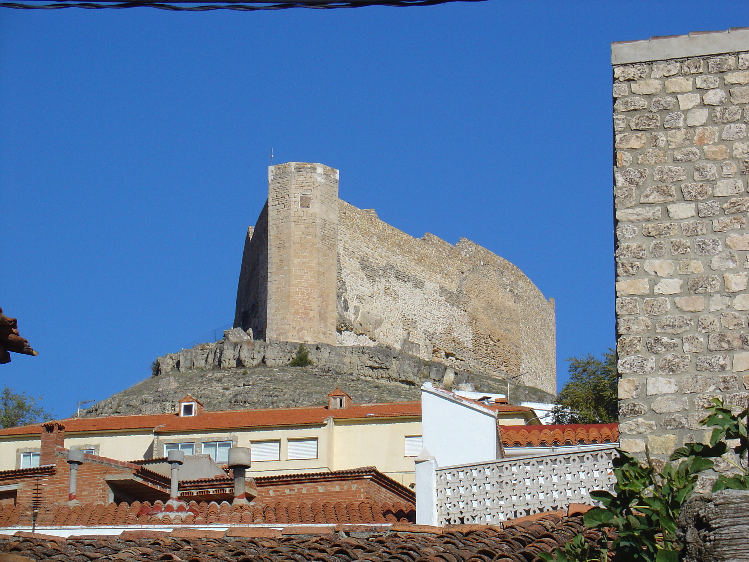 Castillo de Cañada del Hoyo, en Cuenca (España)